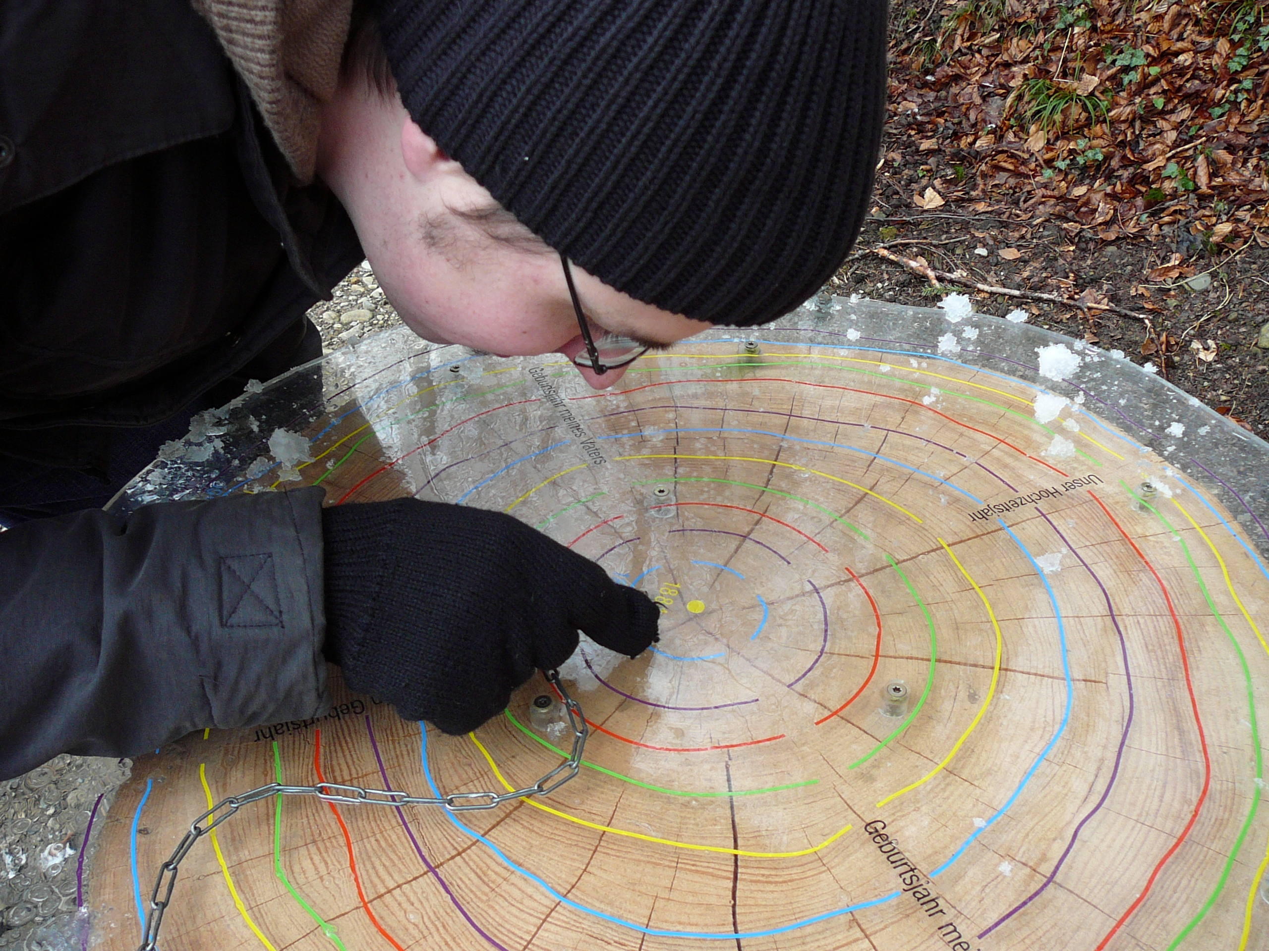 Sihlwald